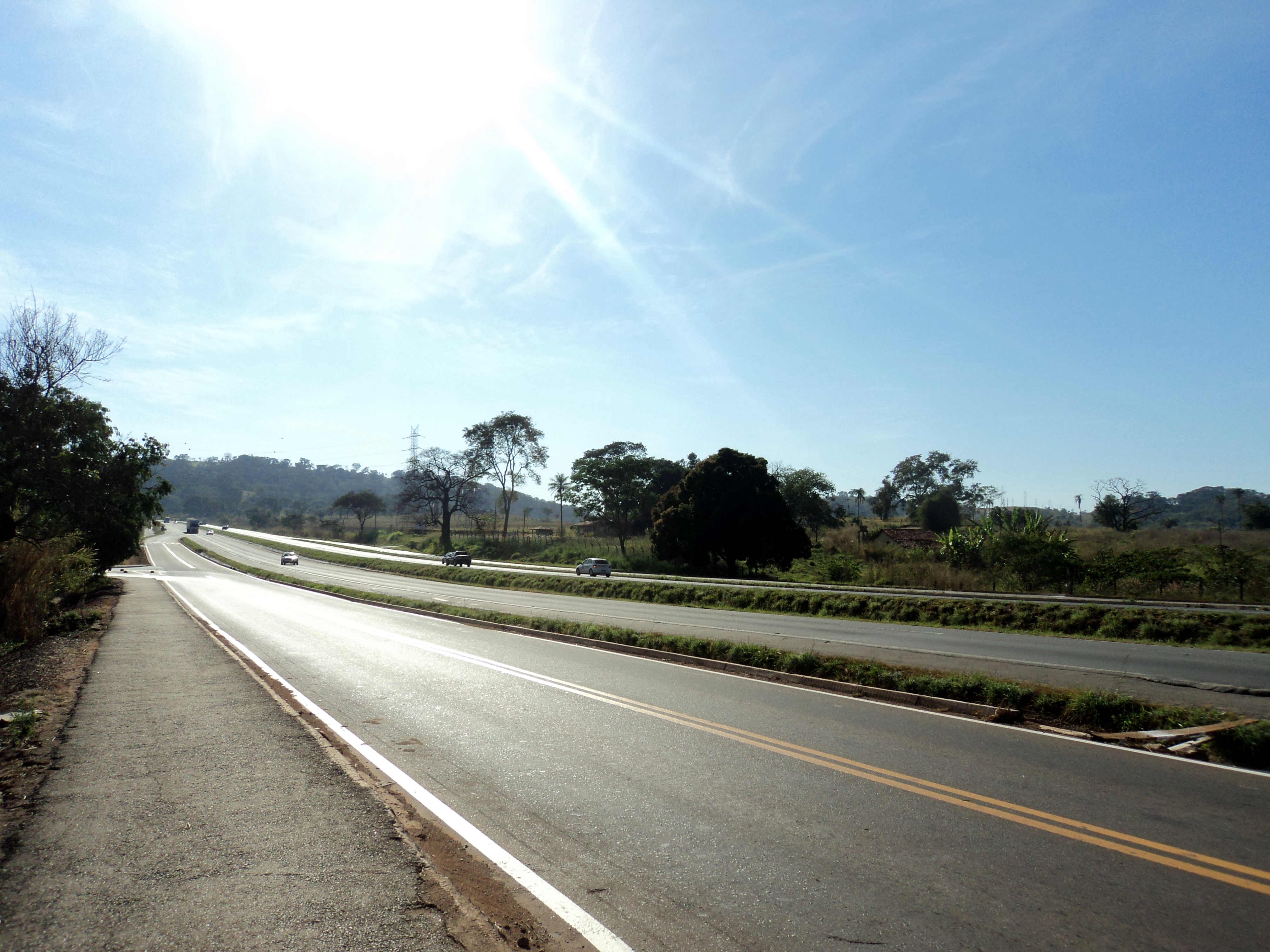 Trecho concomitante entre a BR-060 e a BR-153 em Goiânia, próximo aos bairros Aldeia do Vale e Vale dos Sonhos, em julho de 2012.